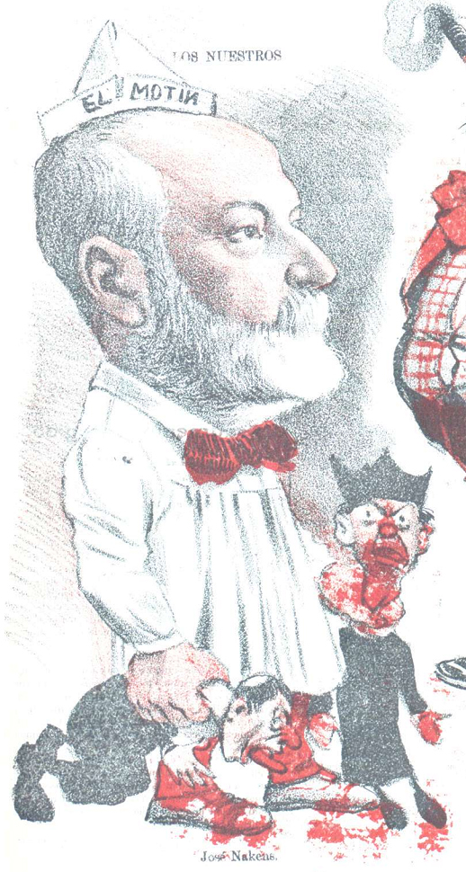 Caricatura.